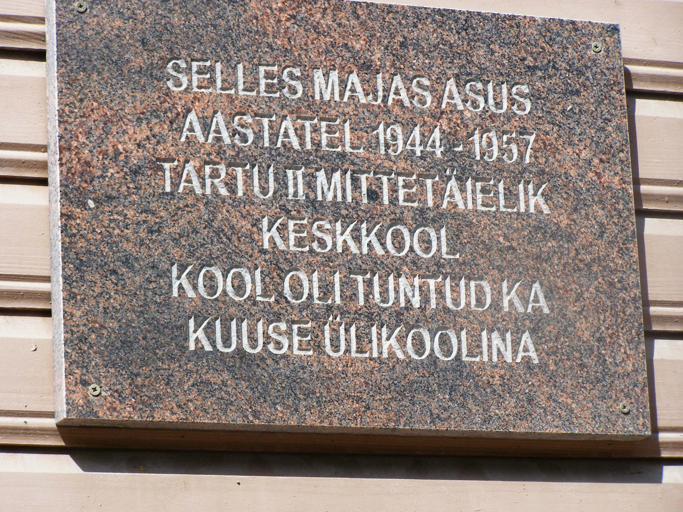 Tartu II Mittetäieliku Keskkooli hoonel Kesk tn 19 olev tahvel.